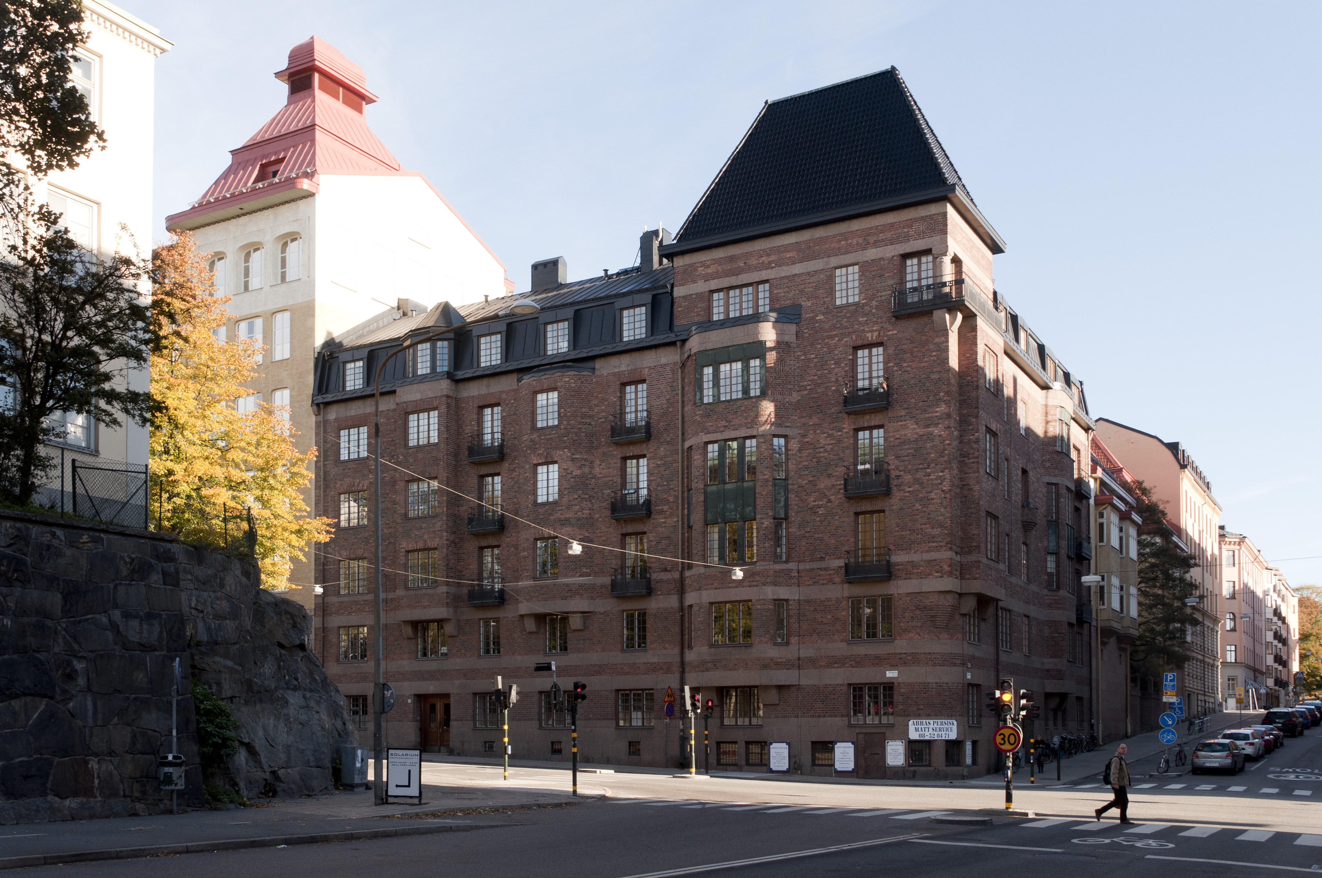 Dalagatan 12, Tegnérgatan 48, Stockholm Byggnadsår 1911-13, arkitekt Edvard Bernhard, byggherre och byggmästare I Ekström.